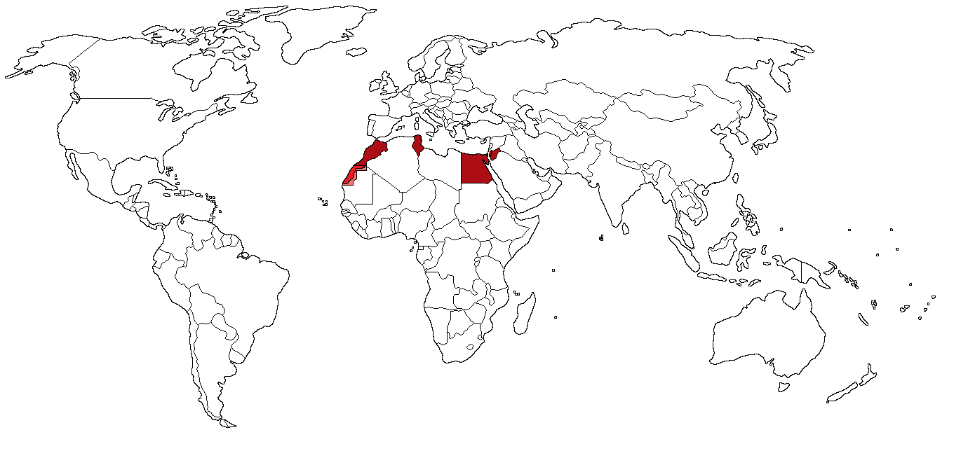 Acuerdo de Agadir, se incluye el estatus político del Sahara Occidental